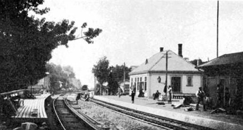 Bryn stasjon i Oslo tidlig på 1900-tallet